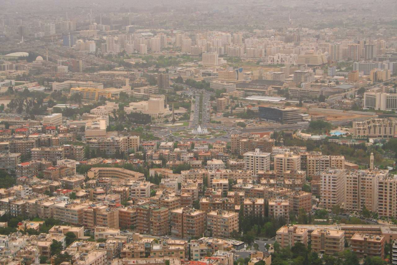 Damascus Skyline